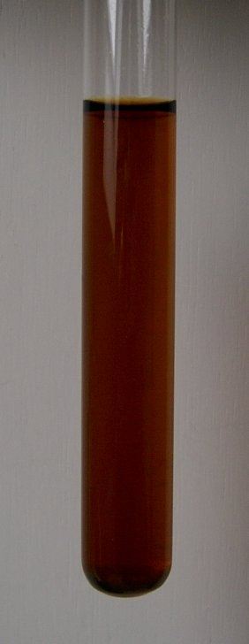 Amminocobalt(III)-komplexe: Hexaamminocobalt(III)-chlorid und Aquapentaamminocobalt(III)-chlorid